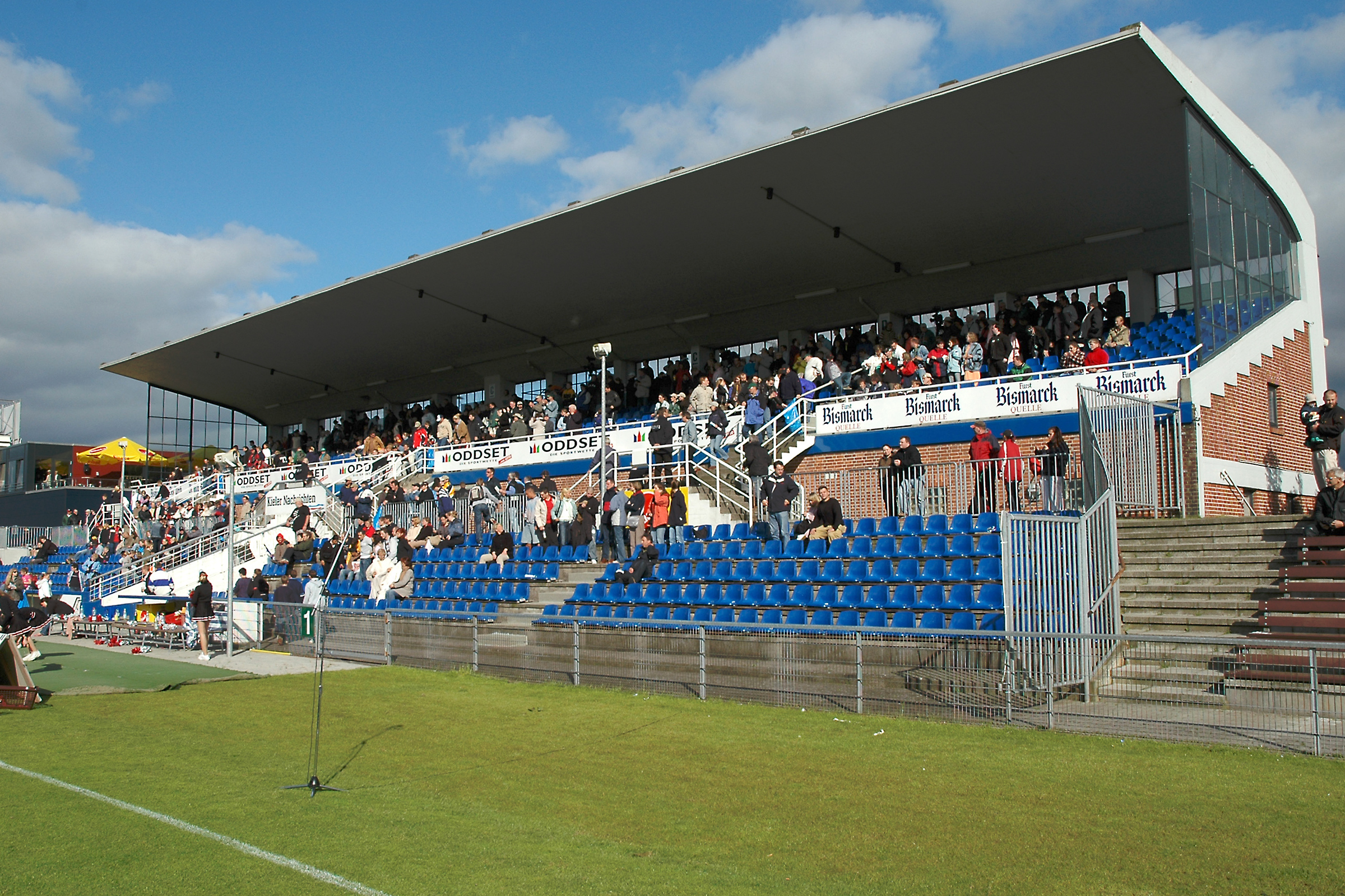 Holstein-Stadion Kiel (aka Inge Meysel-Gedächtins-Stadion :-) ), bei einem Spiel der Kiel Baltic Hurricanes